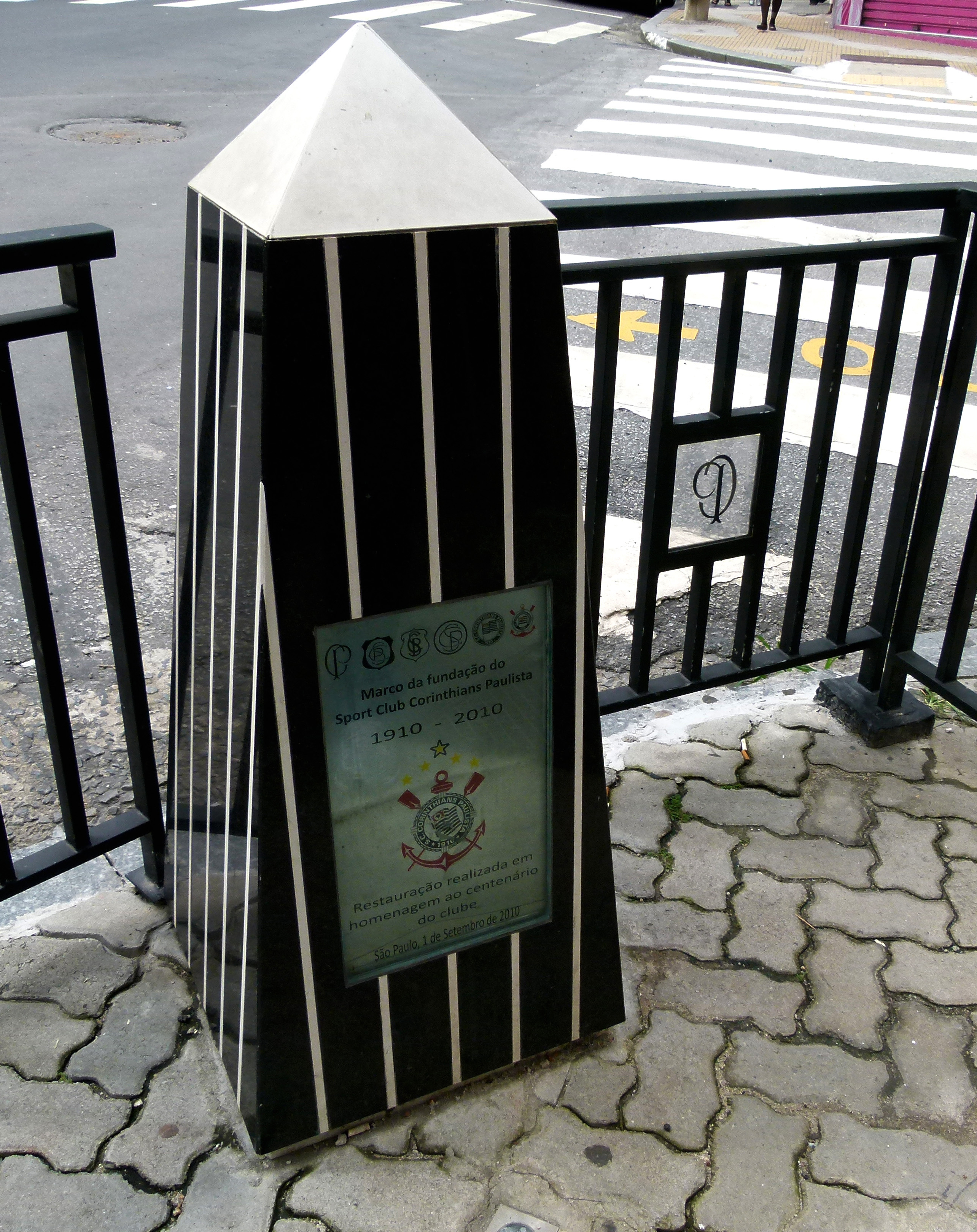 Urna com os restos mortais do 1° corinthiano. Marco da fundação do Corinthians, localizado na esquina da Rua José Paulino c/ Cônego Martins. Bom Retiro - SP.